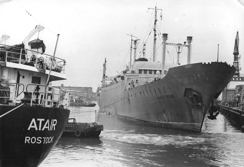 Rostock, Überseehafen, Fang- und Verarbeitungsschiff Zentralbild Karnitzki 29.6.1964 00629-03-2 In Vorbereitung der Ostseewoche 1964 Mit hervorragenden ökonomischen Leistungen haben die Fangbesatzungen und die Leitung der VVB Hochseefischerei bereits einen großen Teil ihrer Versprechen eingelöst, die sie dem Vorsitzenden des Staatsrates der DDR, Walter Ulbricht, vor einem Jahr während der 6. Ostseewoche gaben. So erhöhten sie in den ersten fünf Monaten 1964 ihre Fangleistungen derart, daß schon 20.000 t mehr Fisch angelandet werden konnten, als zur gleichen Zeit des Vorjahres. Unser Foto zeigt das Fang- und Verarbeitungsschiff "Johannes R. Becher ", das den Hafen des Rostocker Fischkombinates zur nächsten Fangreise verläßt.